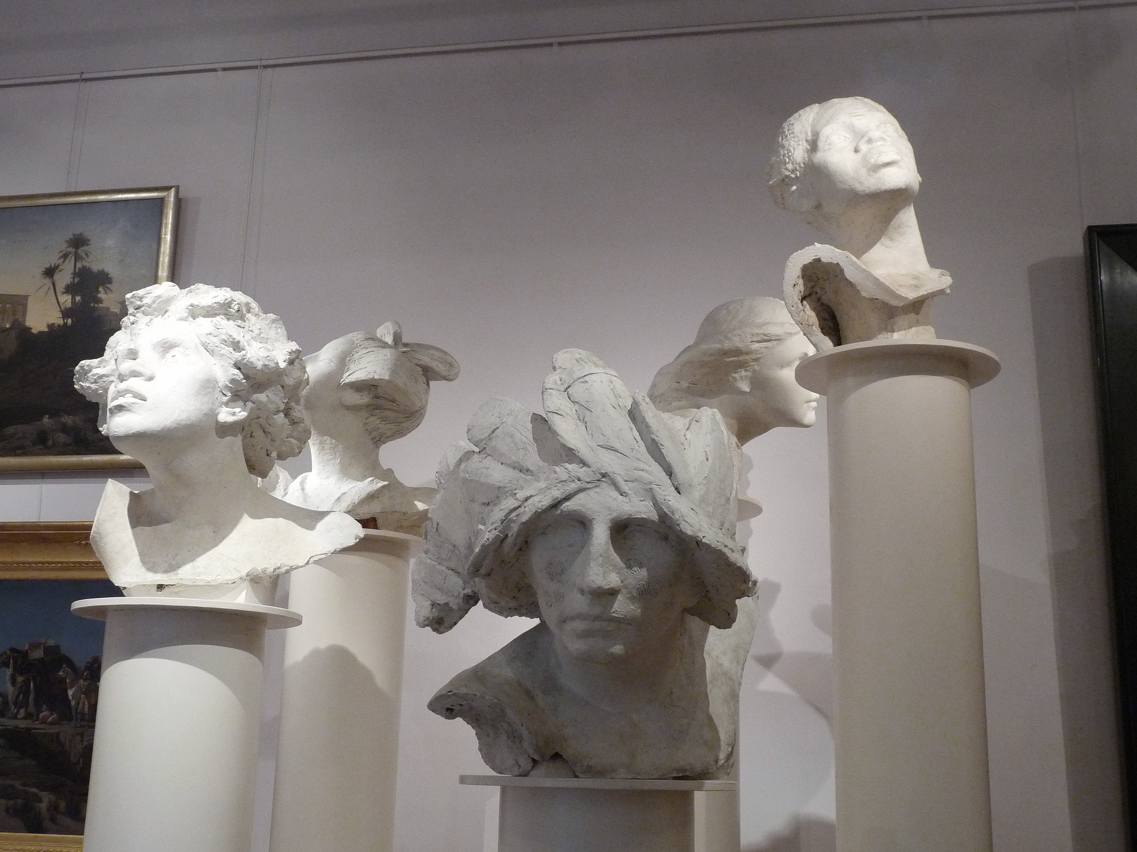 René de Saint-Marceaux : études des têtes des cinq continents pour le monument de l'Union postale universelle, l'Europe, l'Amérique, l'Asie, l'Océanie, l'Afrique. Plâtre (Musée des beaux-arts de Reims)